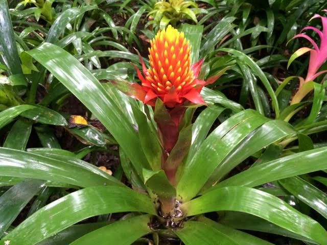 Foto tirada no Parque das Aves em Foz do Iguaçu